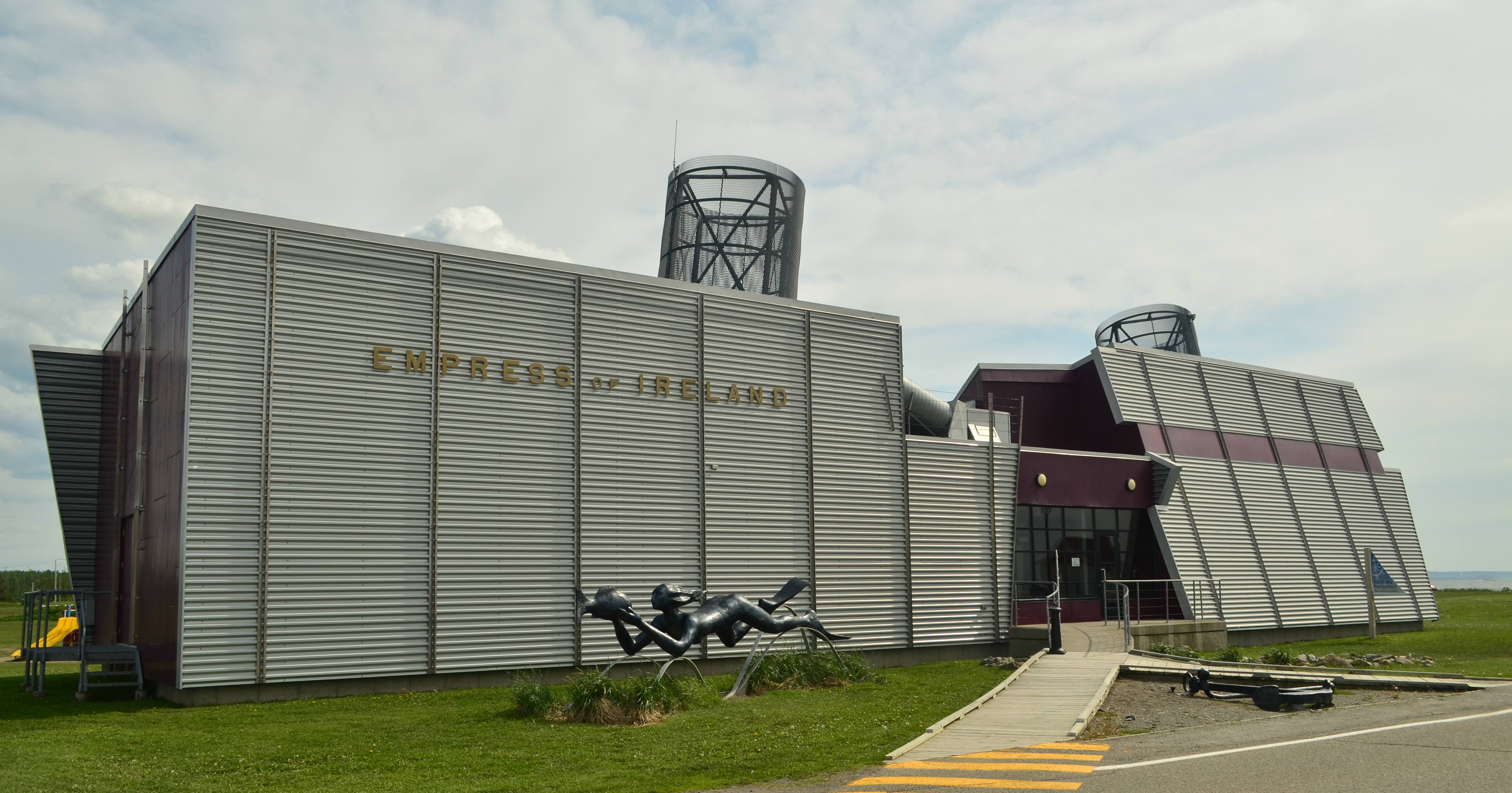 Au phare de Pointe-au-Père